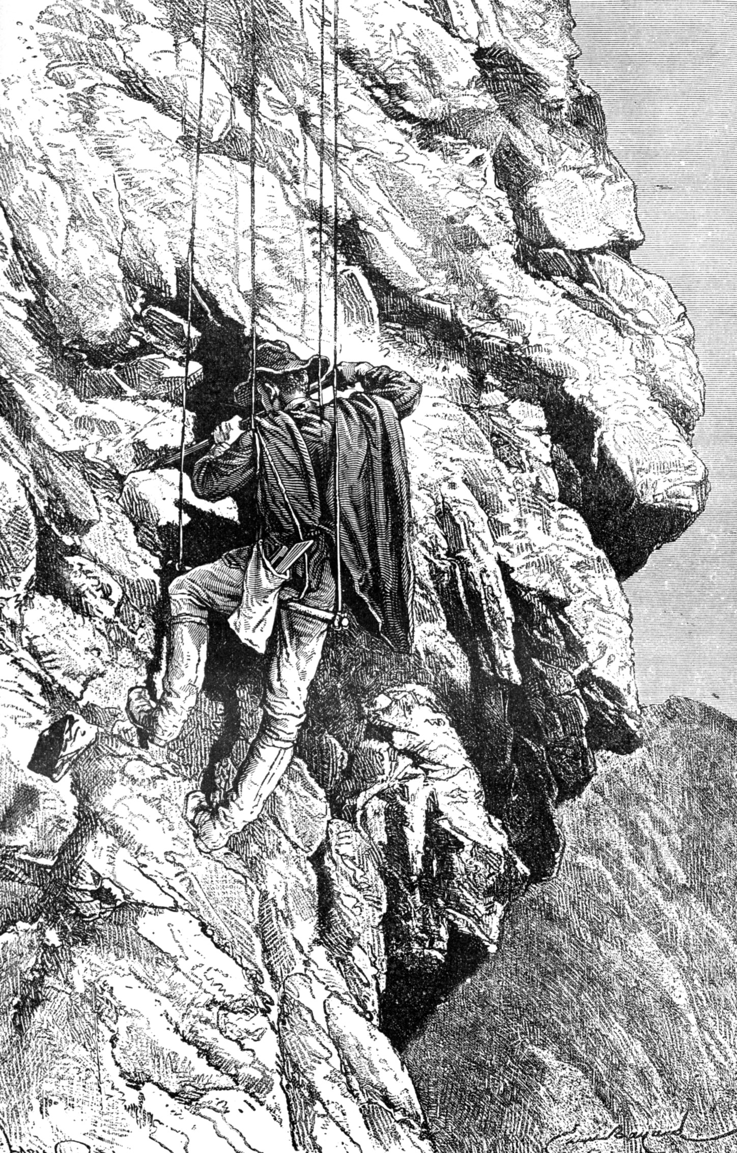 Wiener fouillant une grotte, entre Chavin de Huantar et Huanuco Viejo